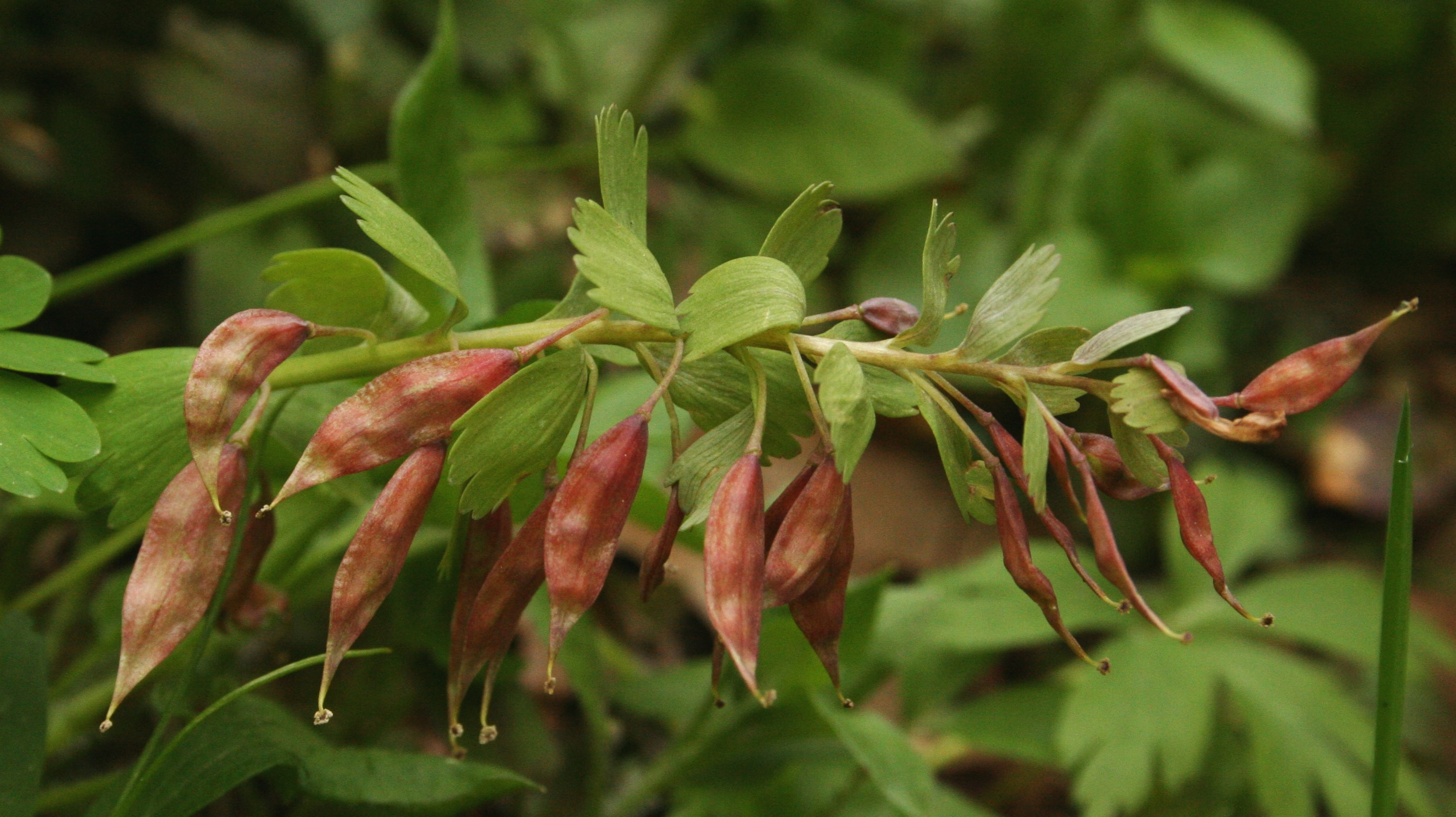 owocująca kokorycz Corydalis sp.